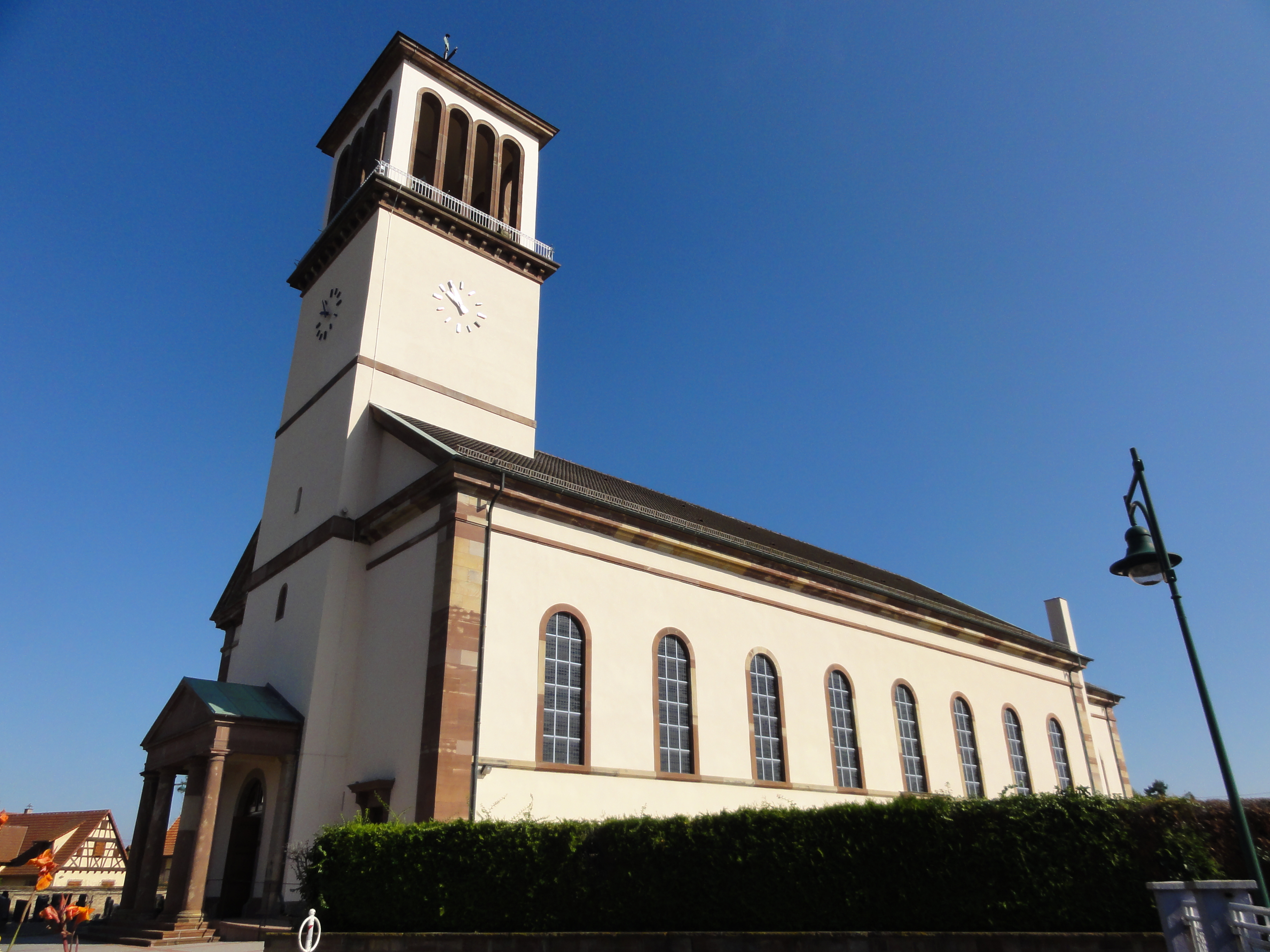 Alsace, Bas-Rhin, La Wantzenau, Église Saint-Wendelin (XIXe-XXe).